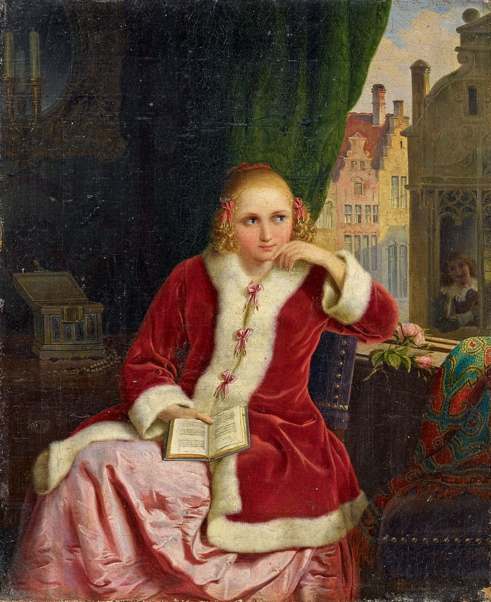 Der Liebesroman. Signiert und datiert unten rechts: H. Rustige 1843 (?). Öl auf Leinwand. 33,5 x 27,5 cm.